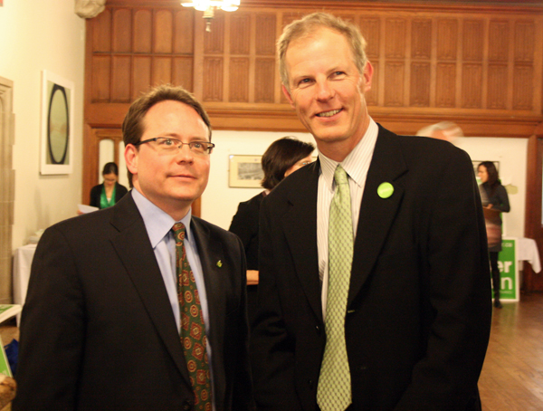 Mike Schreiner (left) and Frank de Jong in 2009